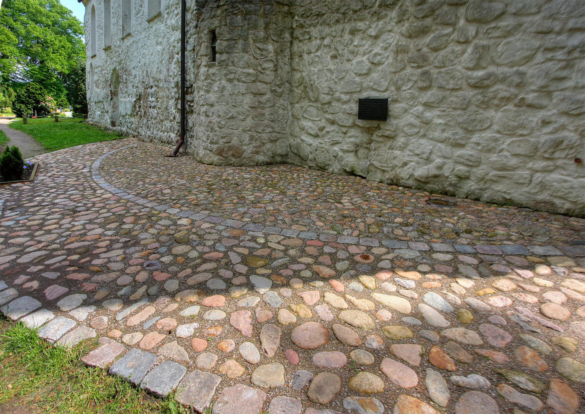 Petrikirche in Bosau, alter Fundamentverlauf durch Feldsteine